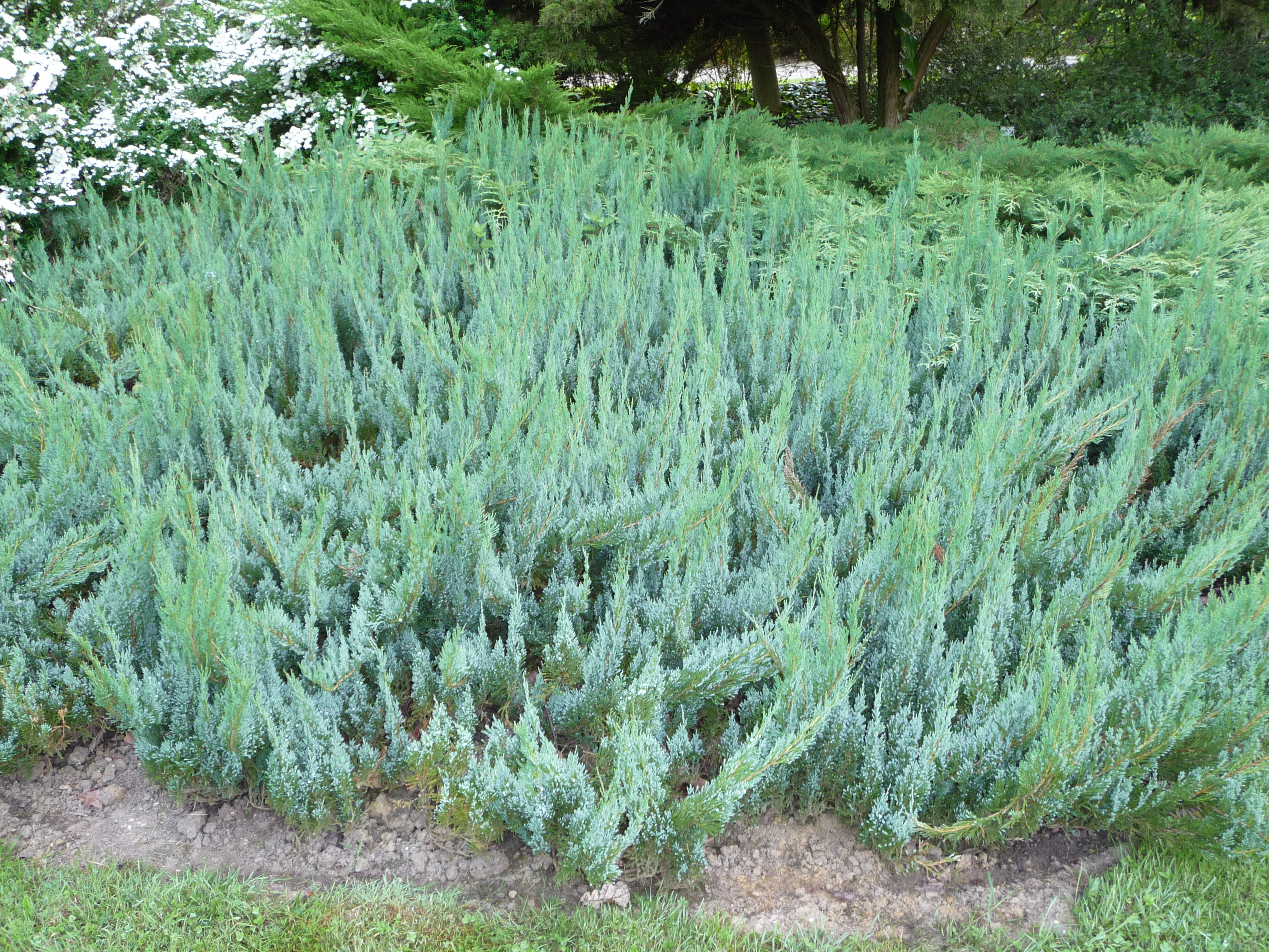 Teppichwacholder 'Alpina'